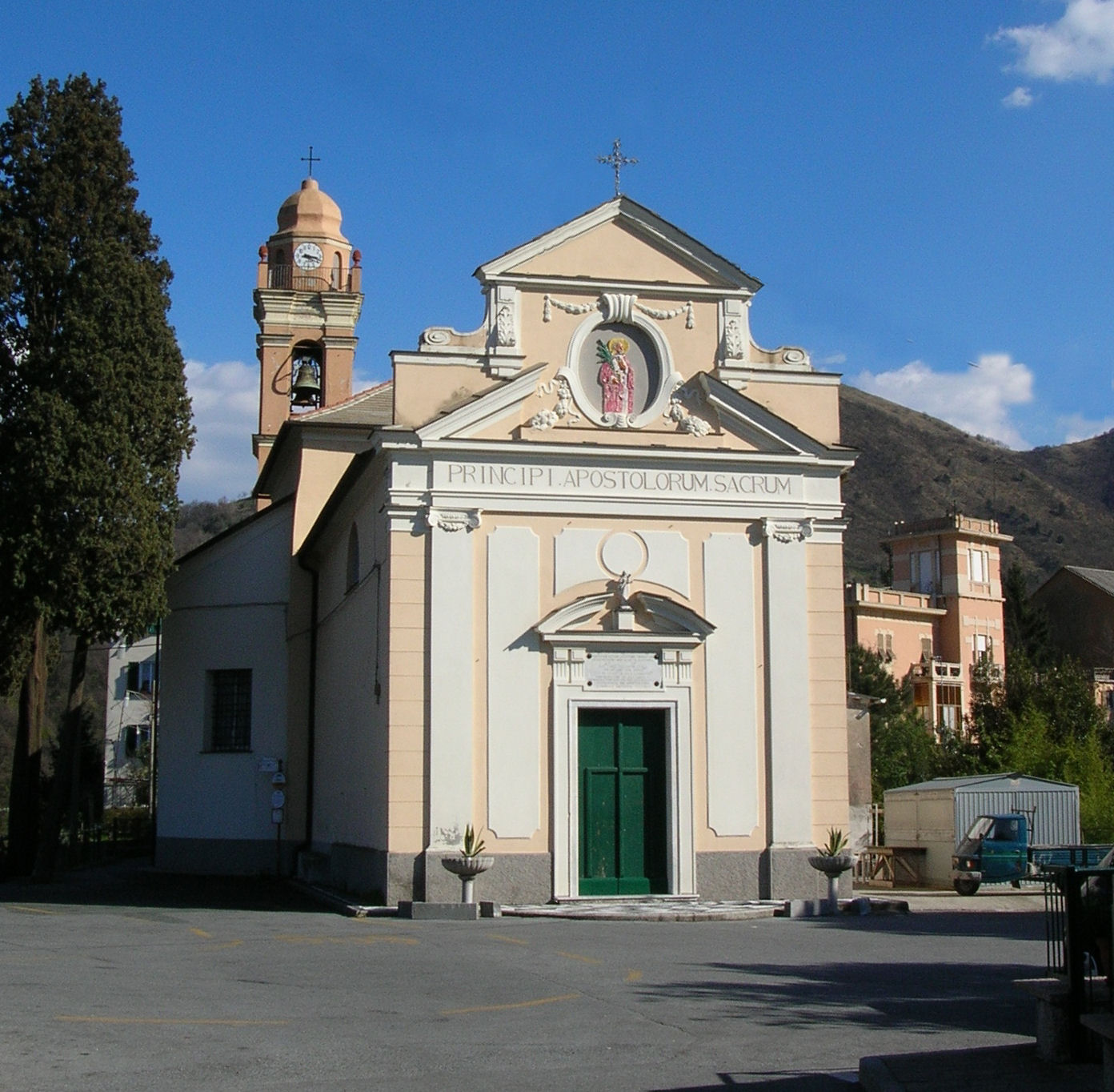 Foto di proprietà Chiesa Cremeno (Bolzaneto - Genova)